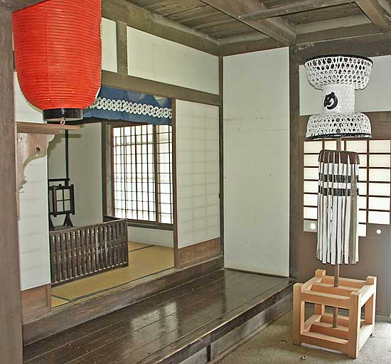 Megumi, Abarembo Shogun, Television series, Toei Uzumasa Studios, Kyoto, Japan.